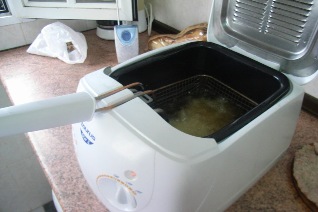 Freidora doméstica /Domestic fryer